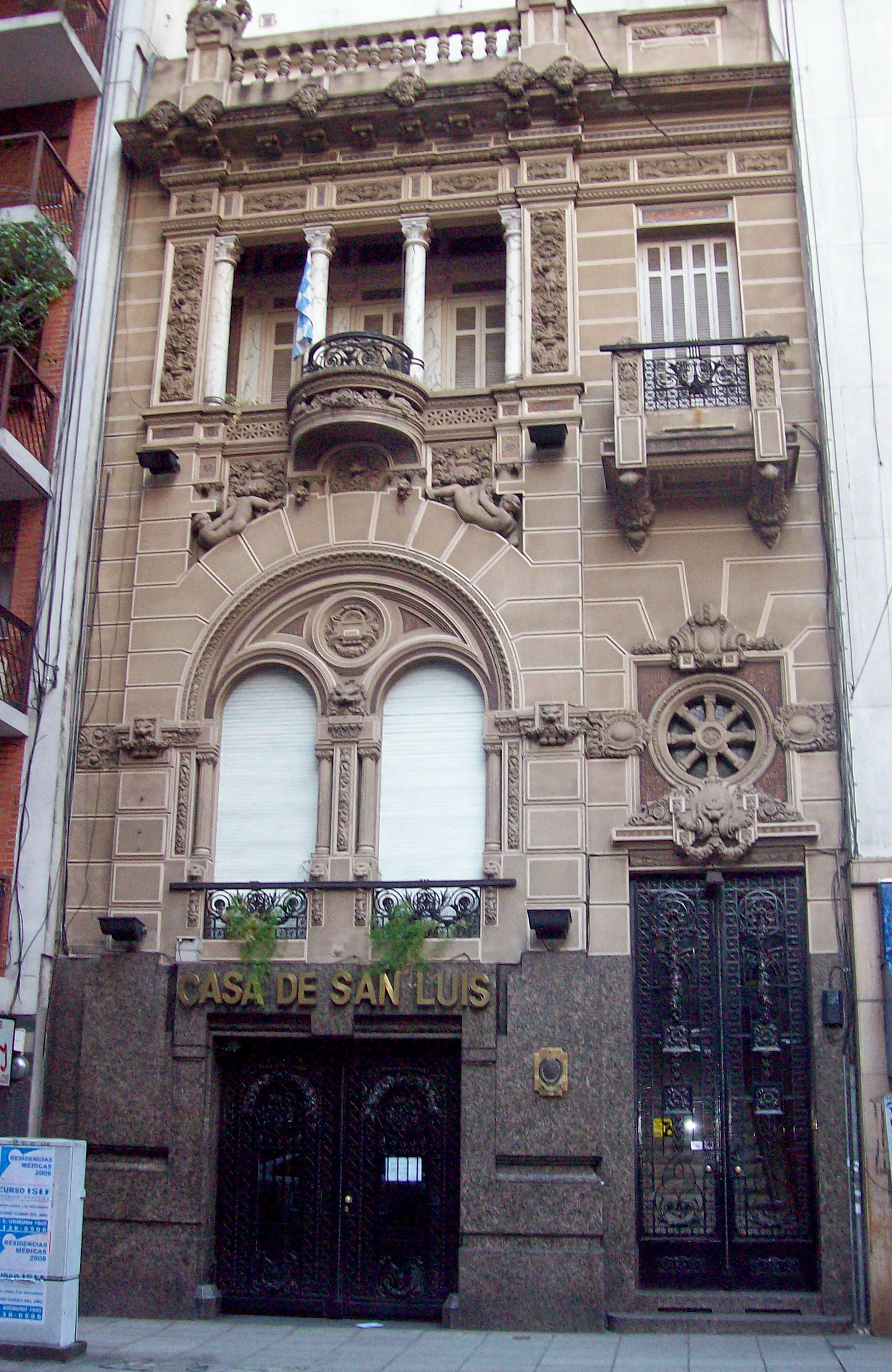 Azcuénaga 1083-1087 (vereda este), Barrio de Recoleta, Buenos Aires. Se trata de la casa de la provincia de San Luis. Foto tomada de OesteNoroeste a Este Sureste).